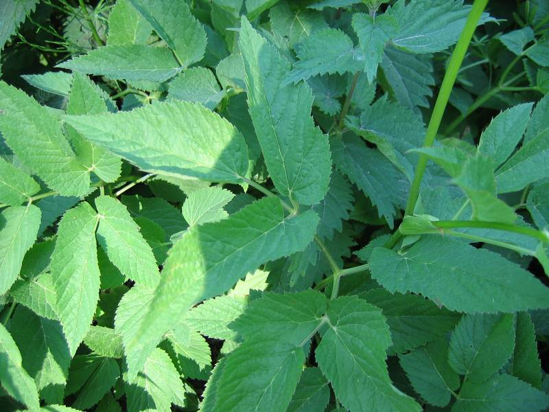 Blatt einer Giersch Aegopodium podadraria